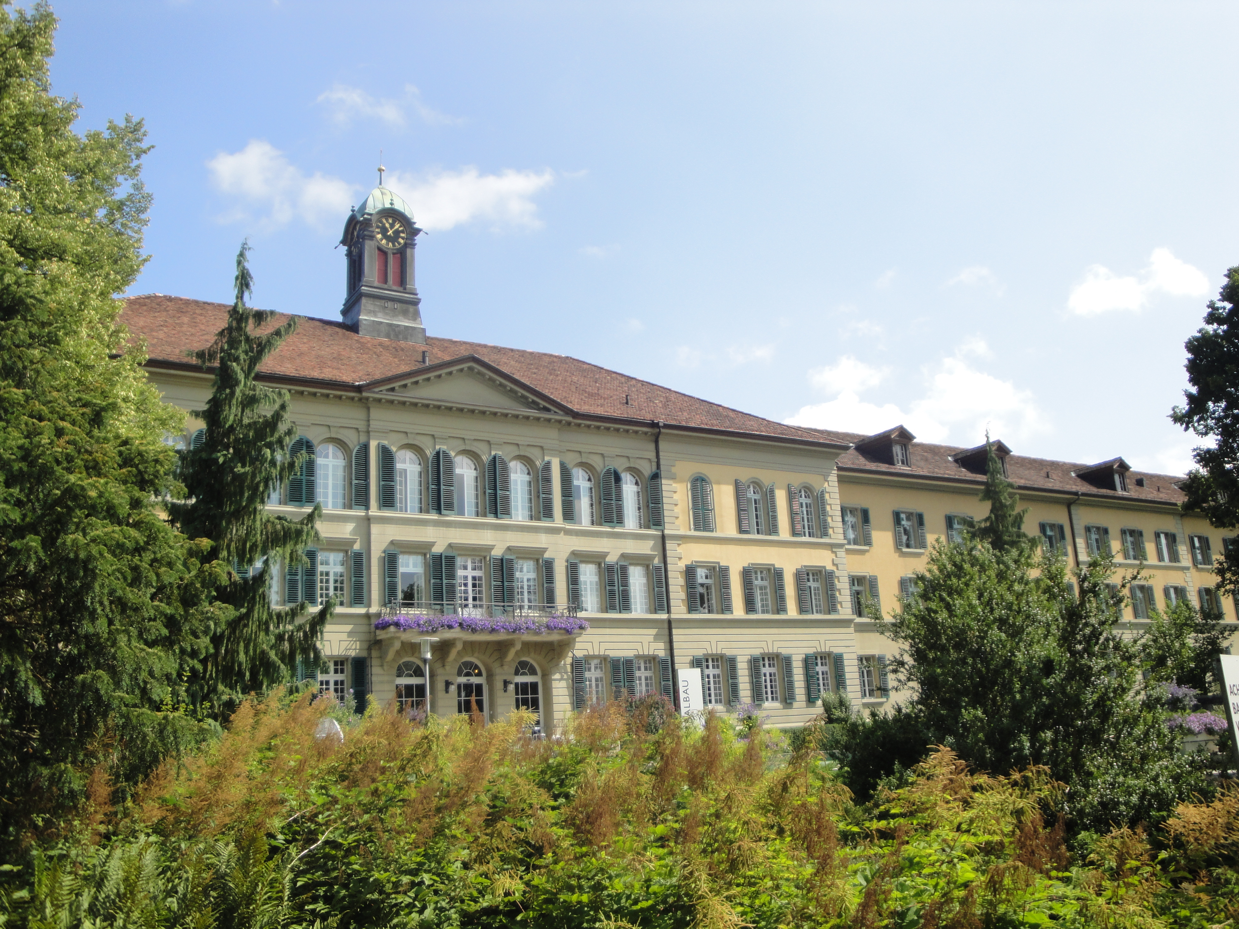 Bern Waldau, Zentralgebäude